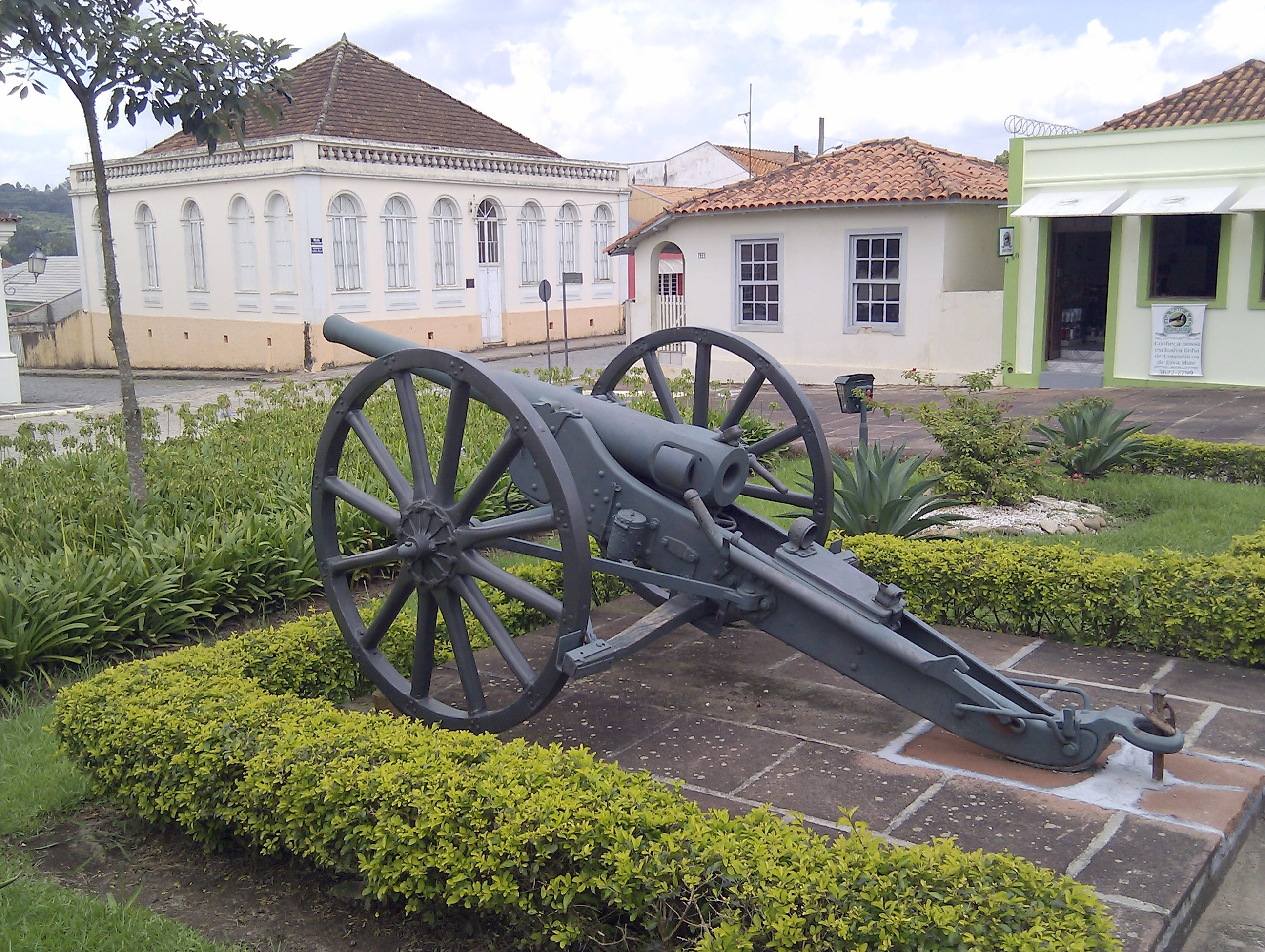 Antigo canhão exposto em frente ao Panteão dos Heróis, na cidade da Lapa (Paraná, Brasil).